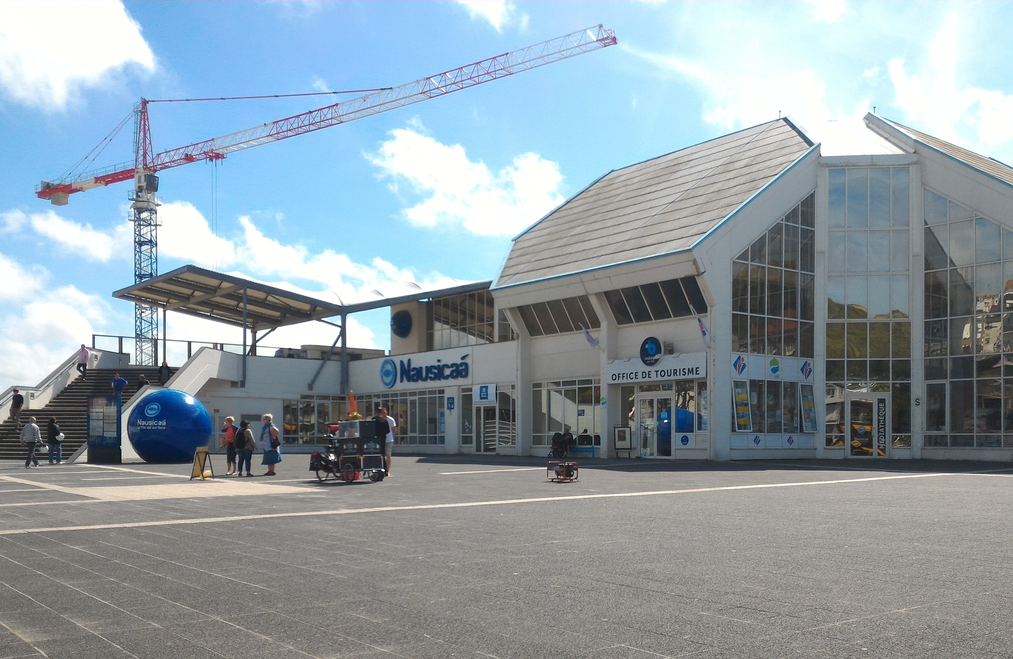 Le centre national de la mer Nausicaá à Boulogne-sur-Mer (62)